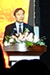 中文（中国大陆）: 中国文化大学校长徐兴庆出席闽江学院海峡学院办学10周年庆典并致辞。摄于2019年10月26日上午。